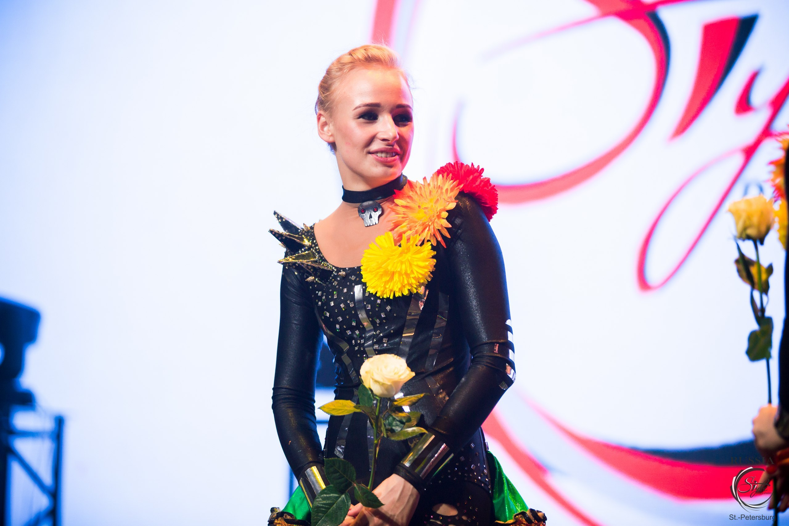 Береговая Ярослава на праздновании дня рождения клуба "Стиль"